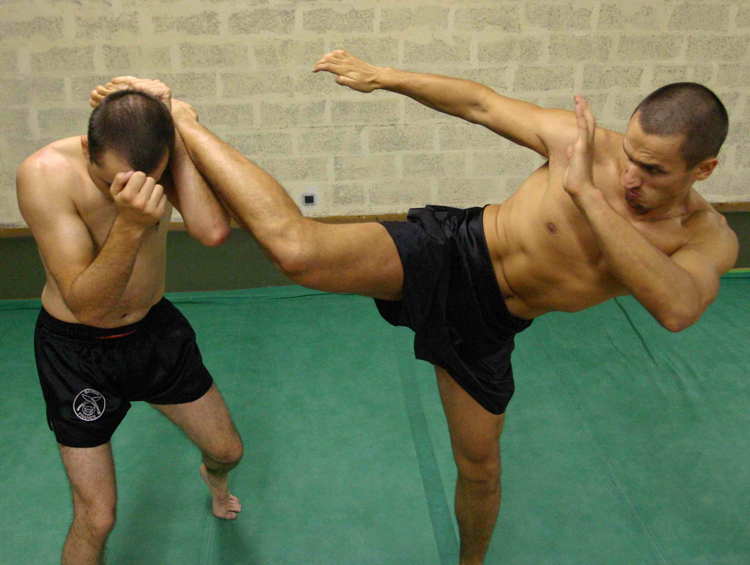 Lethwei-Hight-kick.jpg